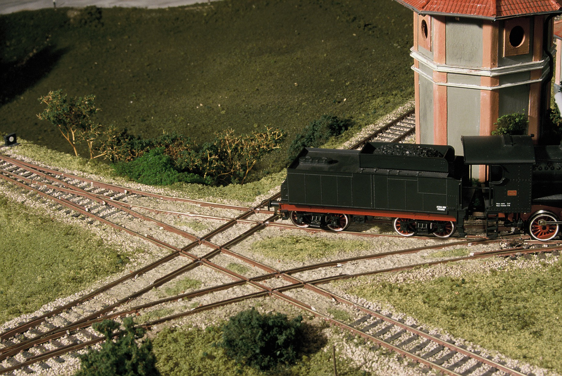 Funktionierender Wendestern (Gleisfünfeck) als H0-Modell